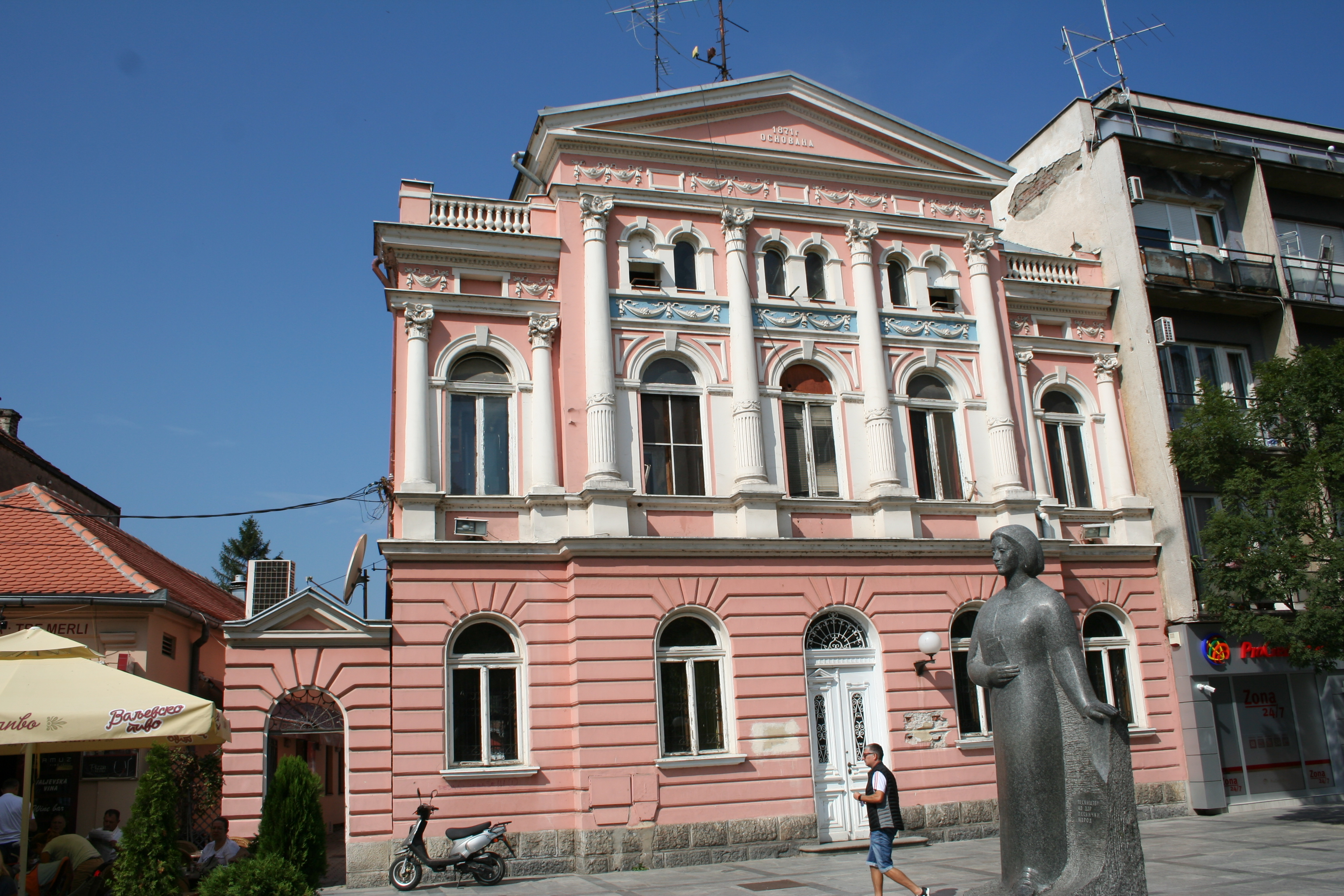 Zgrada štedionice Valjevo